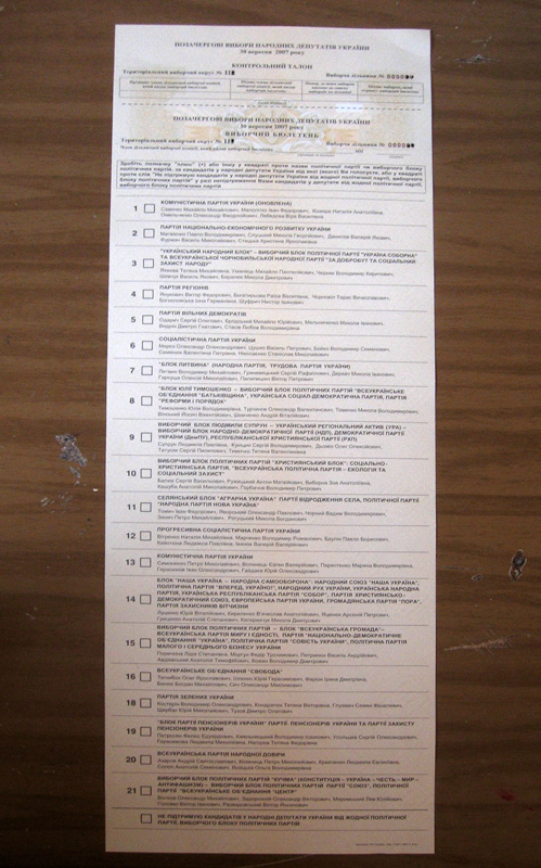 Бюллетень для голосования на выборах в ВРУ 2007